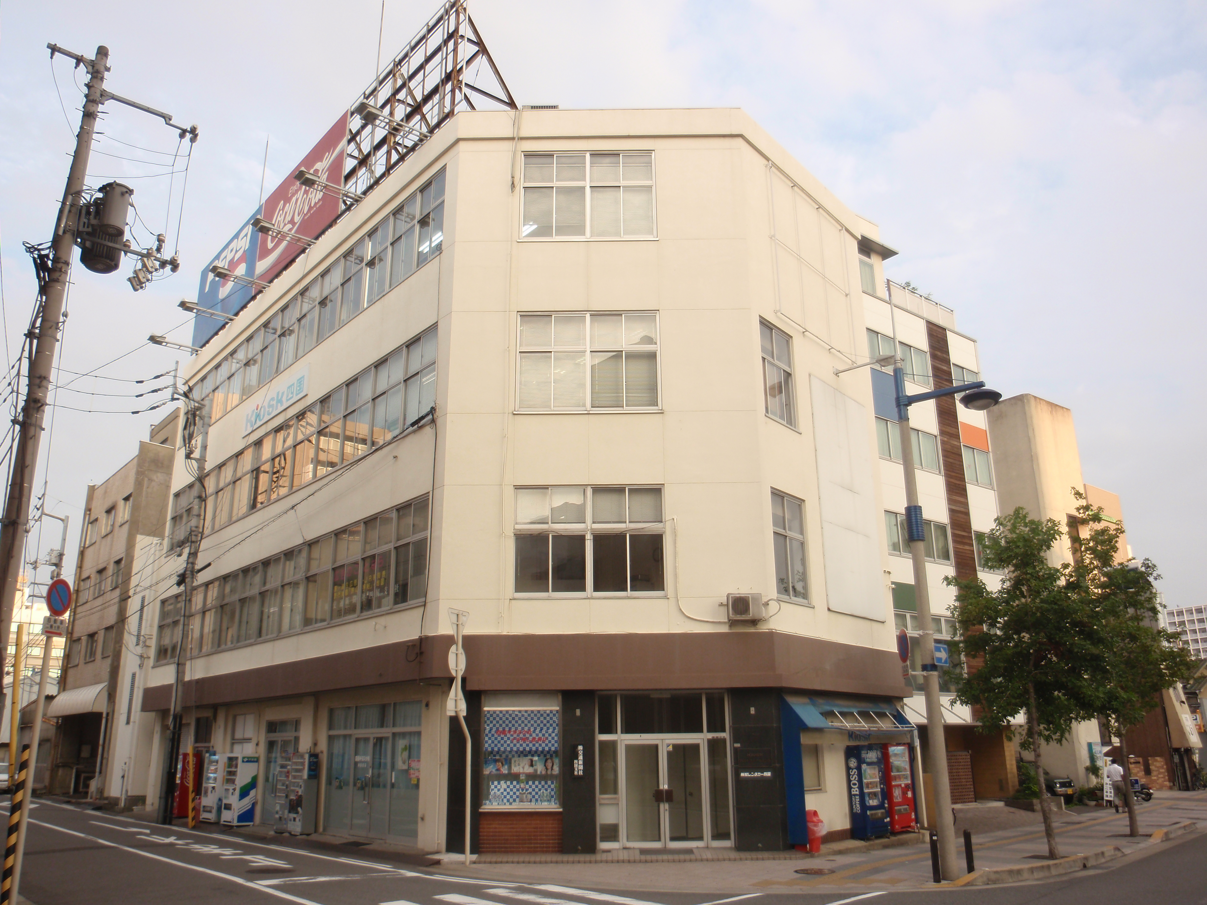 香川県高松市にある四国キヨスクの本社。